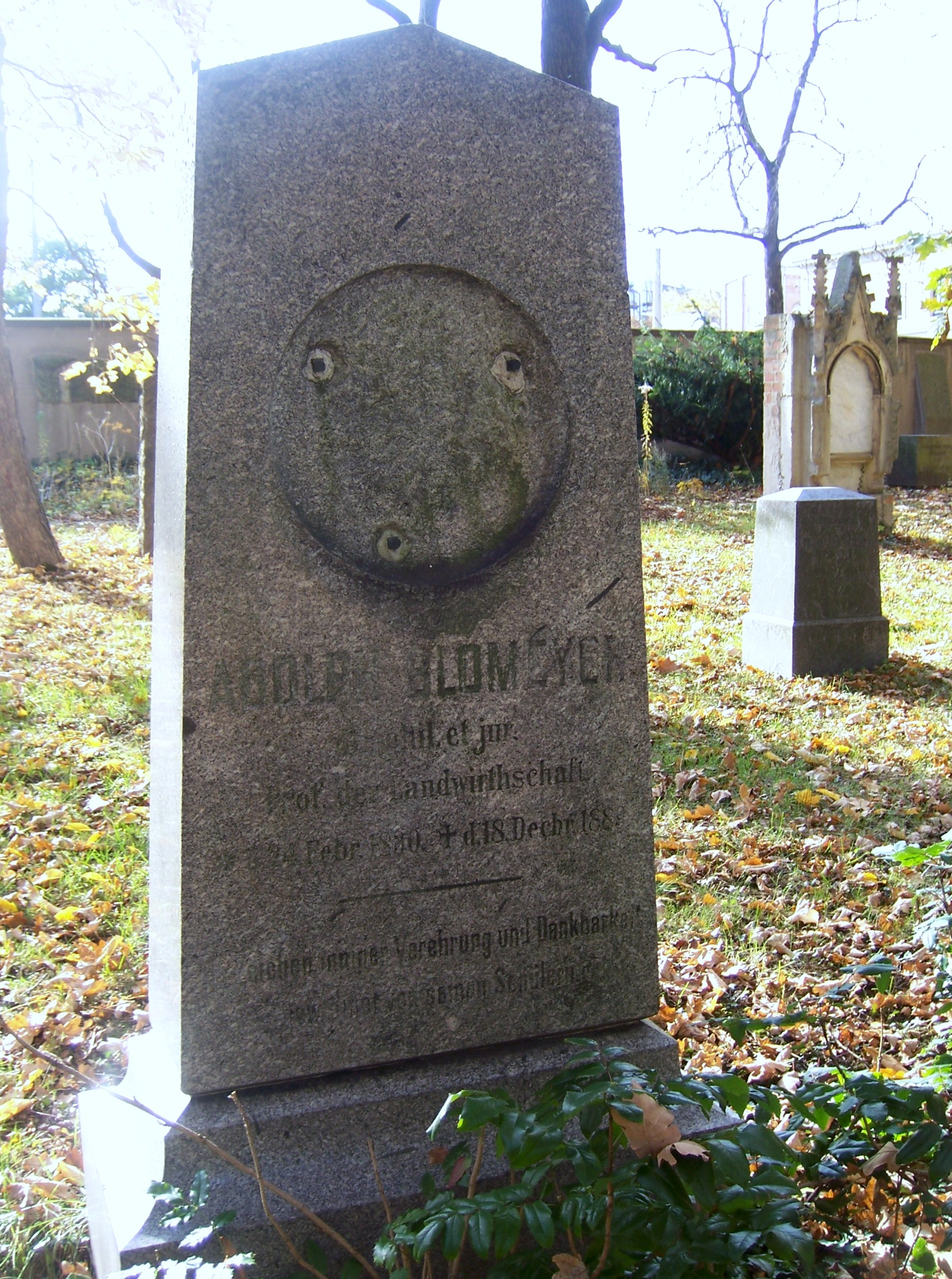 Grabstein Adolf Blomeyer vom Neuen Johannisfriedhof, Heutiger Standort: Lapidarium Alter Johannisfriedhof